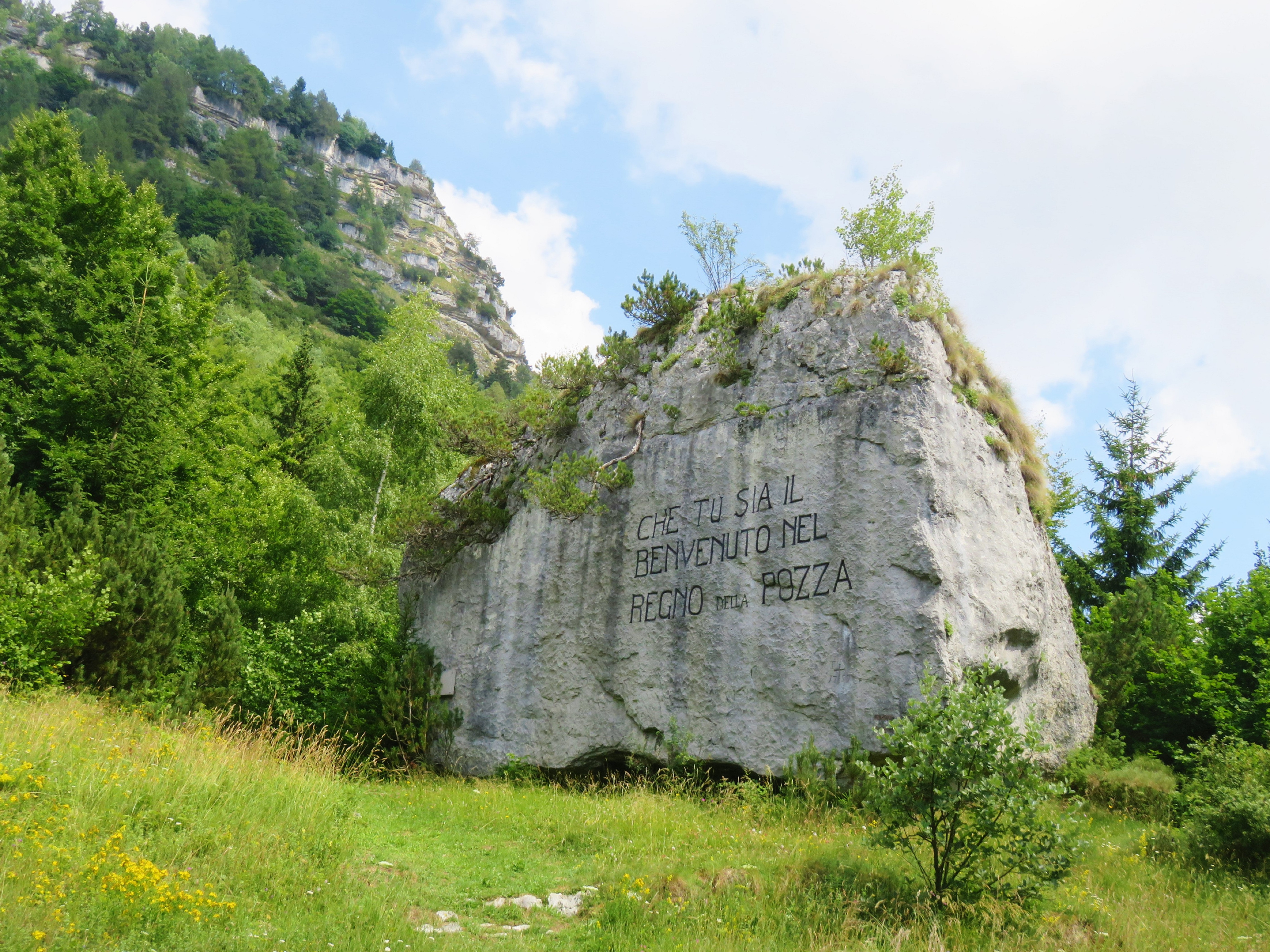 "CHE TU SIA IL BENVENUTO NEL REGNO DELLA POZZA" Frase scolpita sul Sassom, il masso alla fine della Valle del Chèserle, al limite nord-ovest dell’Alpe Pozza, alle pendici del Col Santo